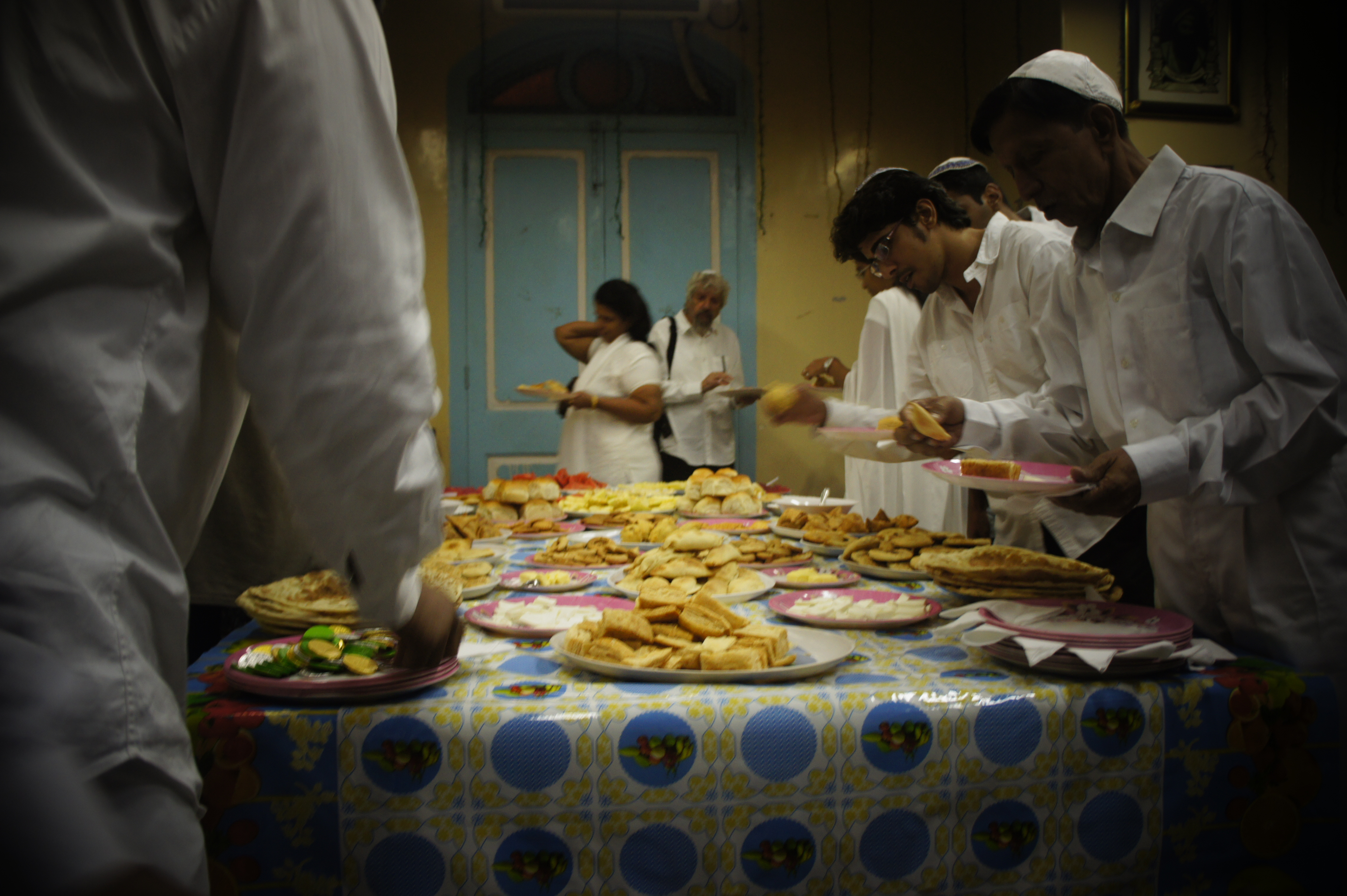 sam litvin 2012